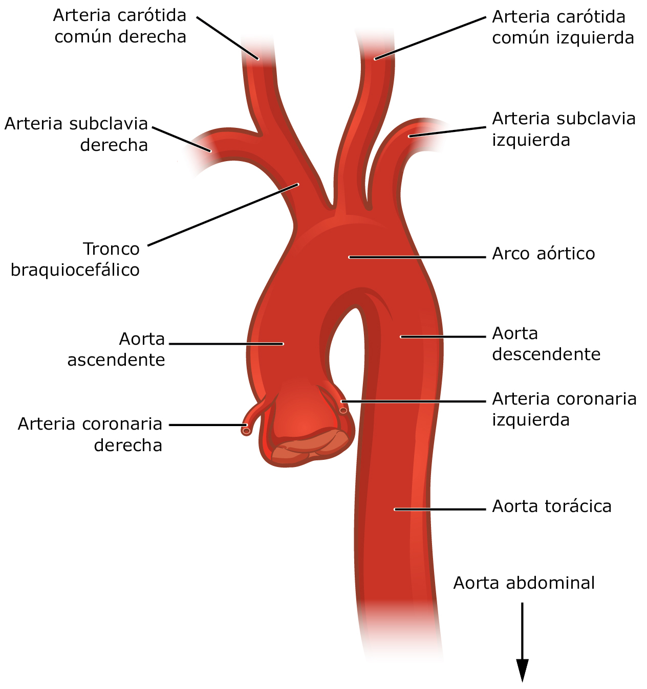 Esquema anatómico en el que se representa la arteria aorta y sus principales ramas